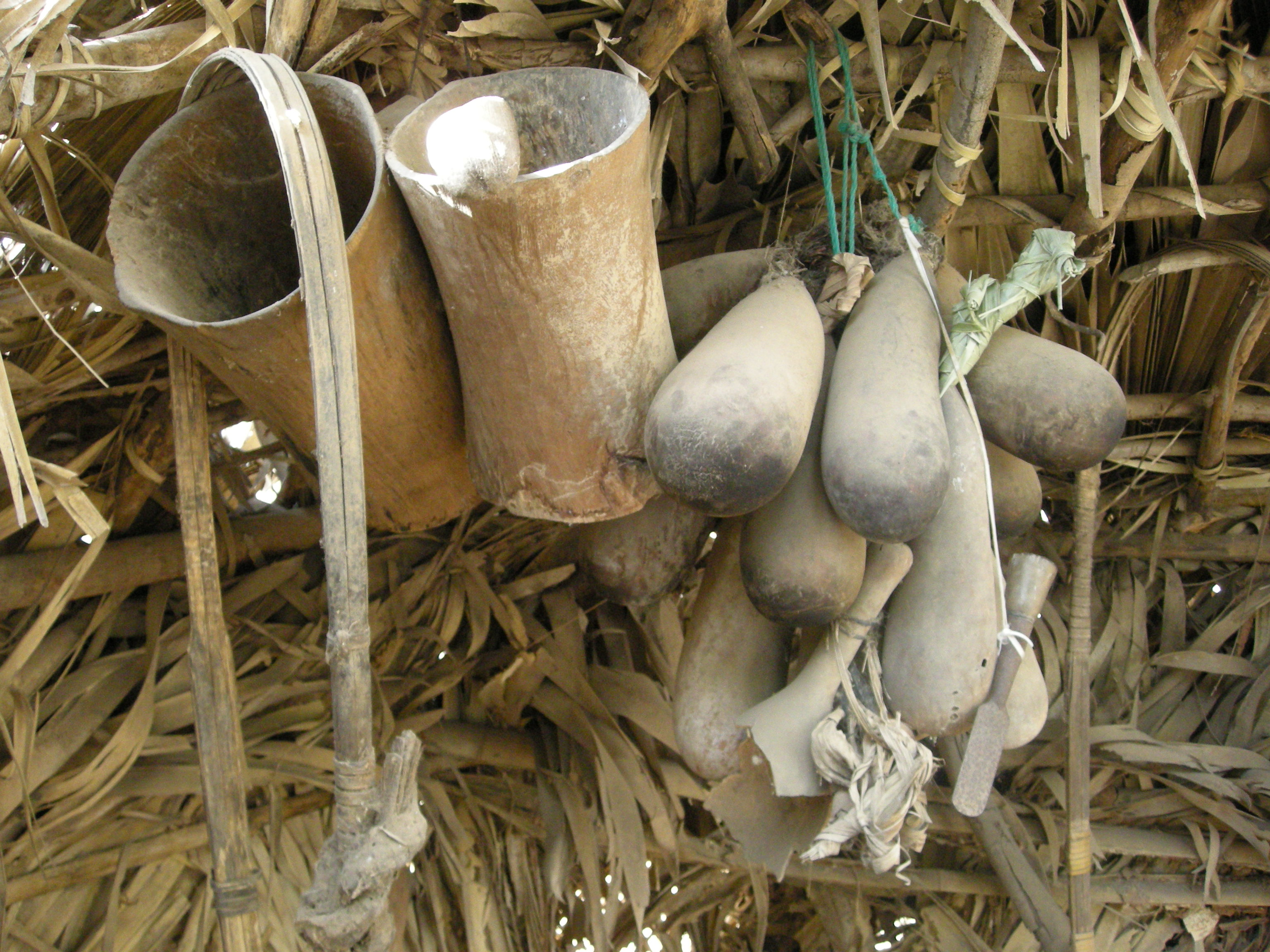 Musée des traditions diolas à Mlomp (Casamance, Sénégal) : à gauche, accessoires pour la récolte du vin de palme, sangle, récipients et louche